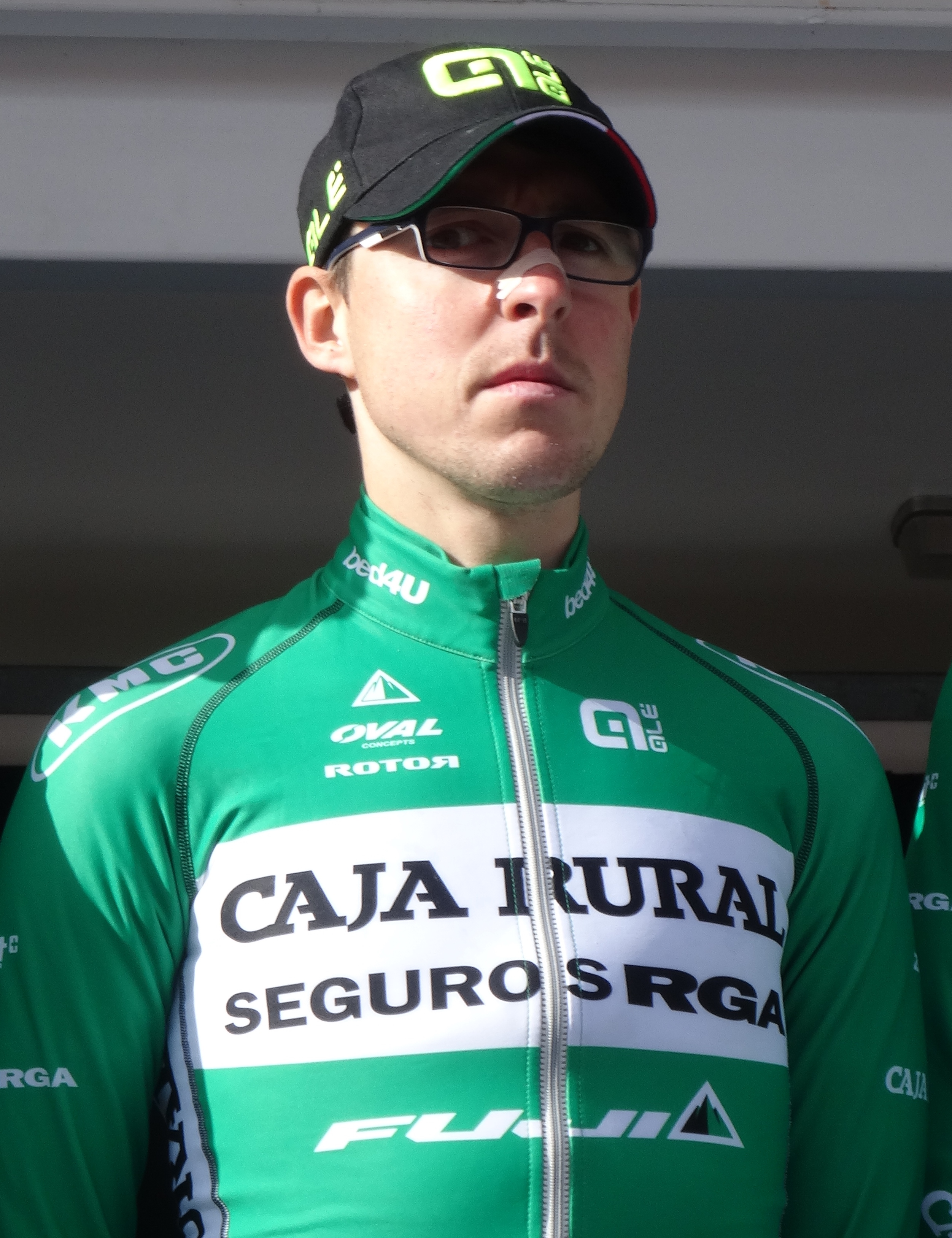 Reportage réalisé le mercredi 4 mars à l'occasion du départ du Samyn des Dames 2015 et du Samyn 2015 à Quaregnon, Belgique.